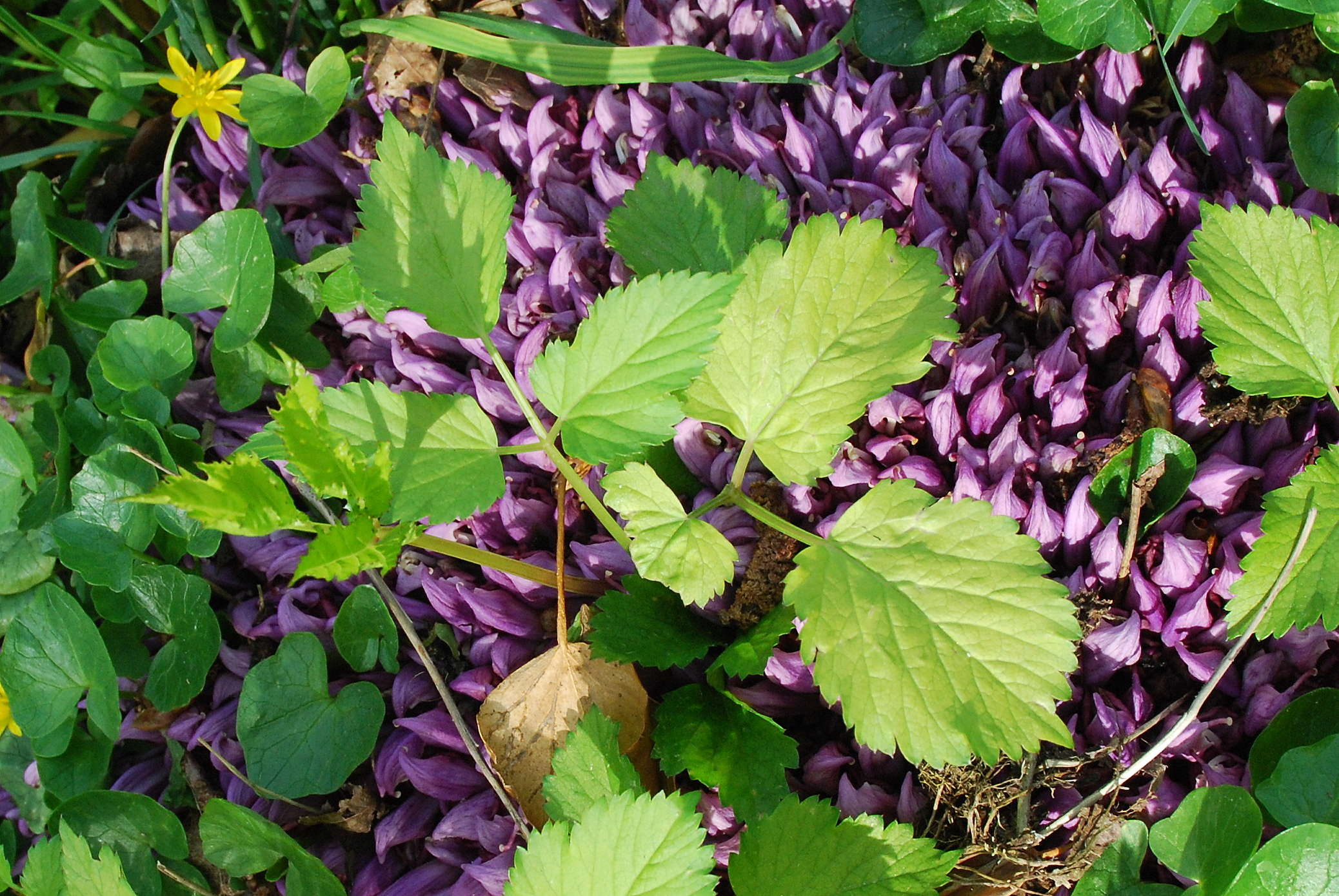 Paarse schubwortel (Lathraea clandestina) langs de Zwalm in België